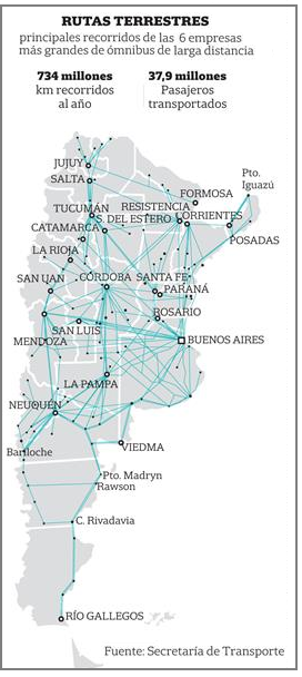 Principales rutas de transporte de omnibus, 2017